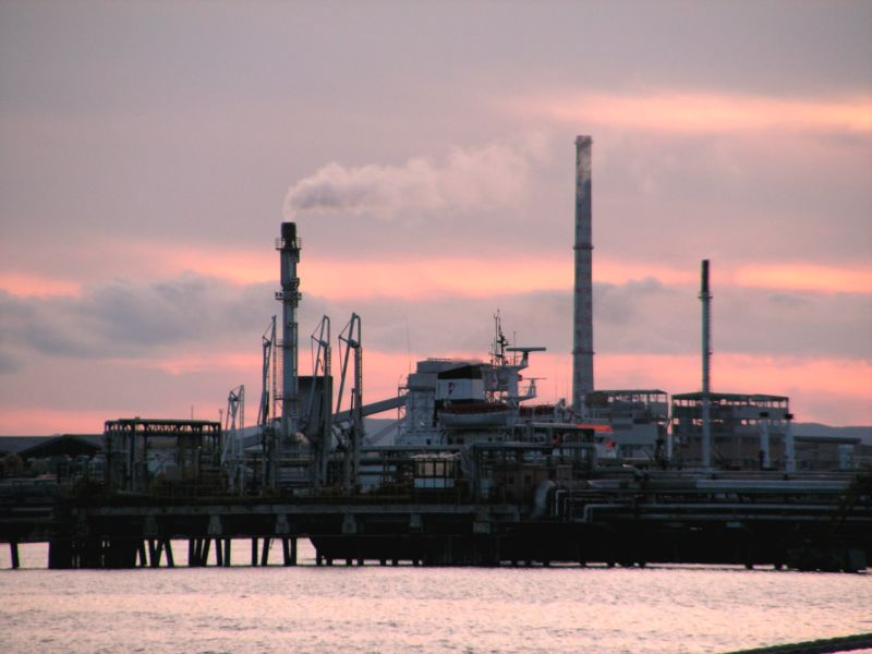 Area industriale di Porto Torres (provincia di Sassari)